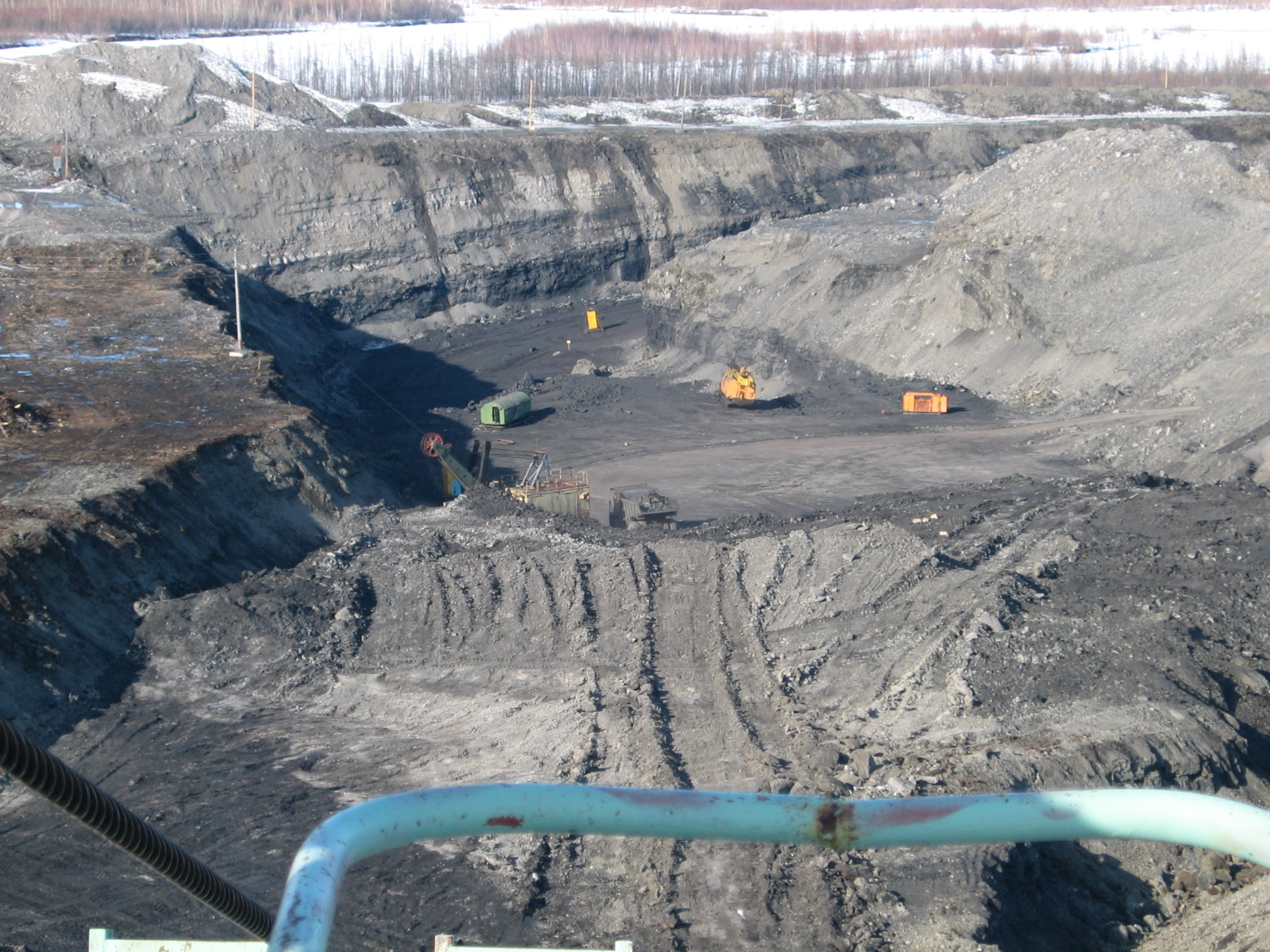 Зырянский угольный разрез